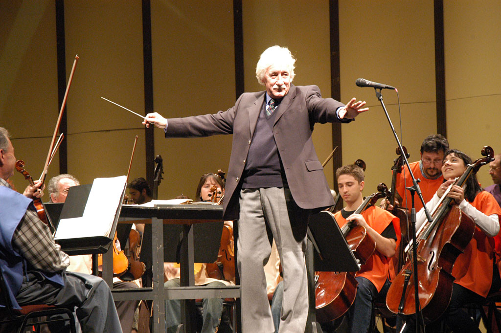 Concierto brindado por la Orquesta Filarmónica de Montevideo (Uruguay), en el Teatro Solís de Montevideo, en el marco del Día de la Amistad Uruguay - Estados Unidos. La fotografía ilustra al director de la Filarmónica, Federico García Vigil recibiendo los aplausos del público.